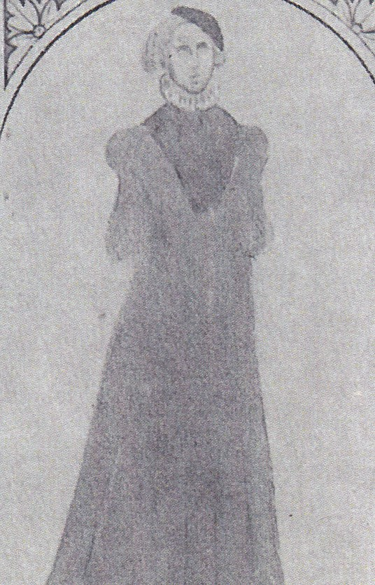 Knud VI's dronning, Gertrud, efter en akvarel af Jacob Kornerup (1825-1913), der forestod afdækning og restaurering af kalkmalerierne i Skt. Bendts Kirke i Ringsted. Billedet repræsenterer det yngste billedlag i den såkaldte "dronningefrise", men selve kalkmaleriet er ikke længere bevaret eller genopmalet, og findes nu kun som Kornerups akvarel.